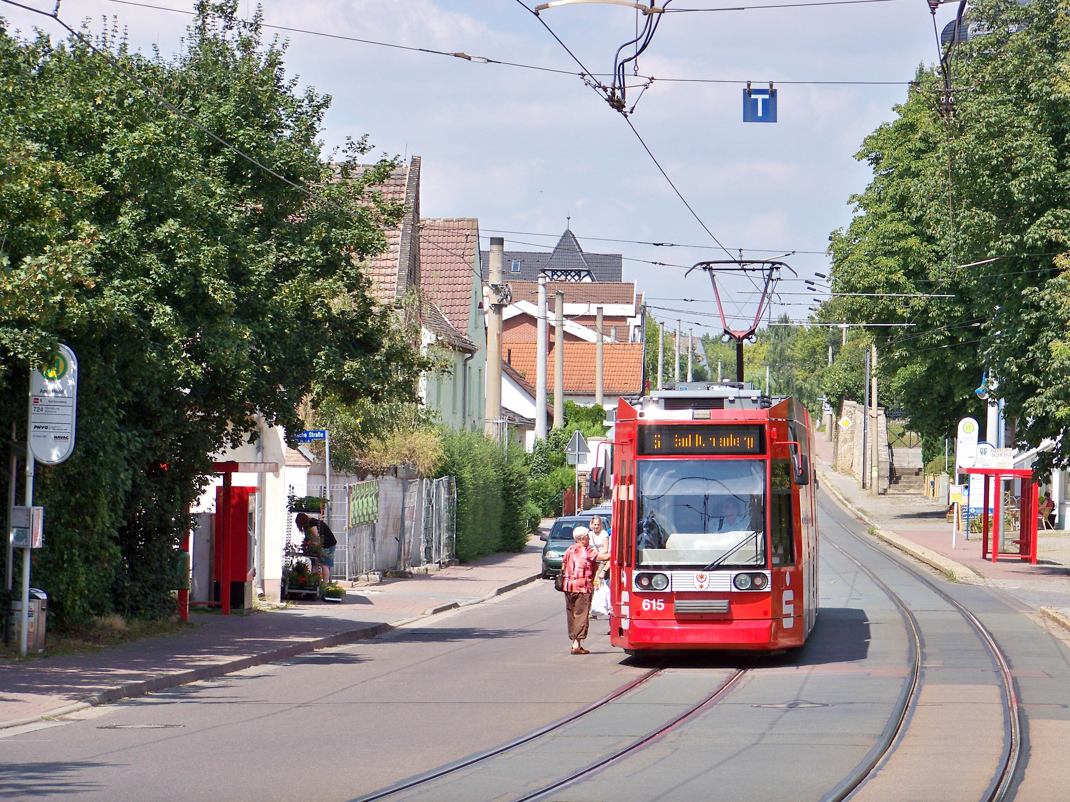 Straßenbahnlinie 5 der HAVAG in Schkopau